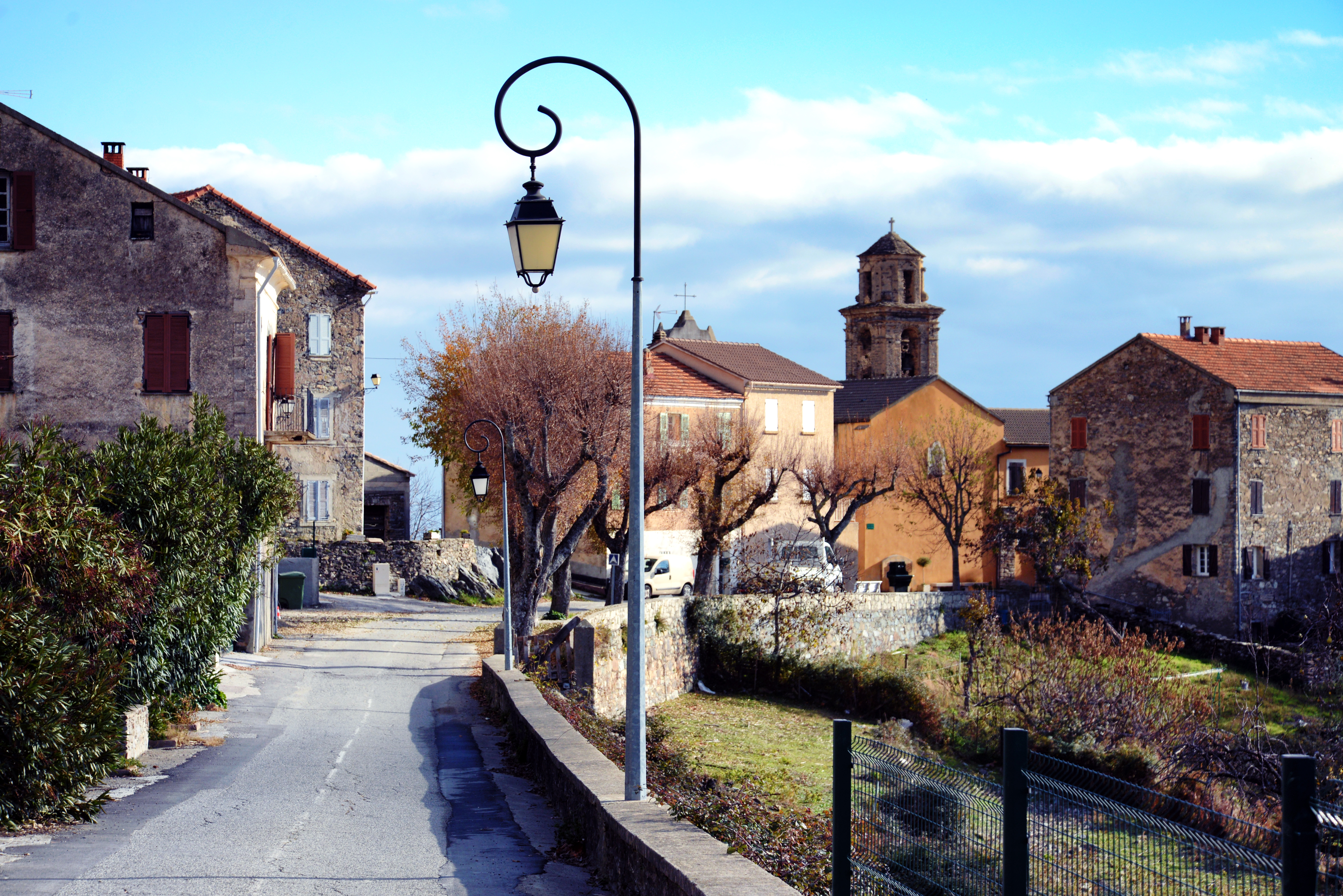 Pietraserena, Rogna (Corse) - Entrée du village depuis Piedicorte-di-Gaggio